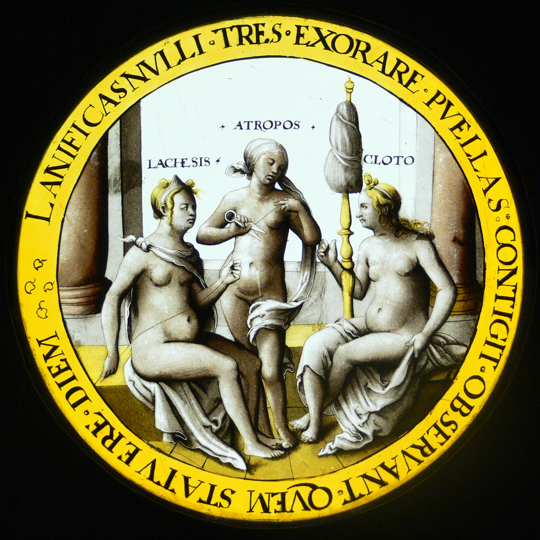 Rundscheibe "Die drei Parzen", von Hans Vischer d. J. (?), Nürnberg um 1530 Kunstgewerbemuseum Berlin, Inv. Nr. AE 470